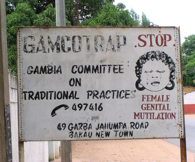 Road sign in Bakua, Gambia